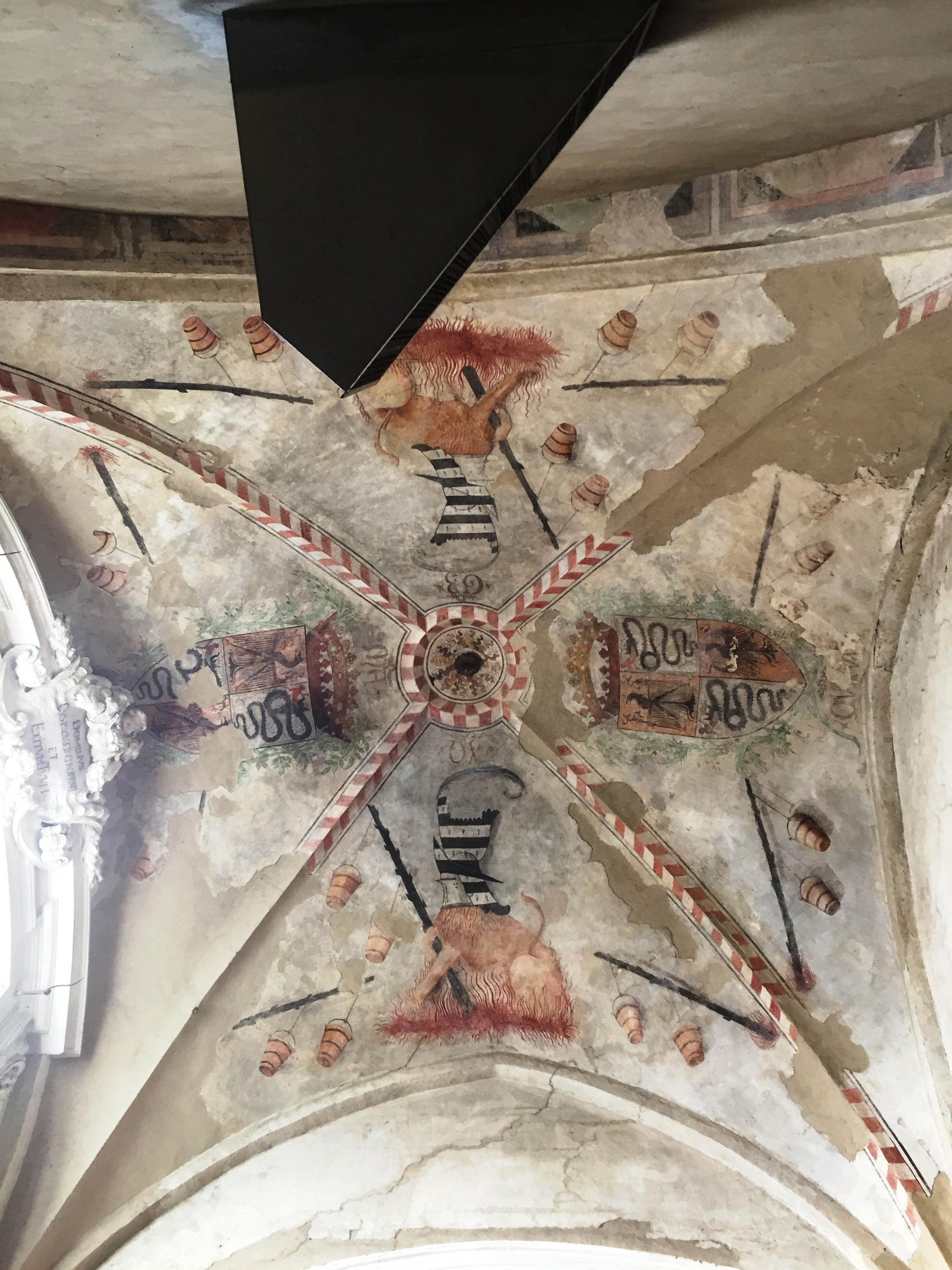 Interno